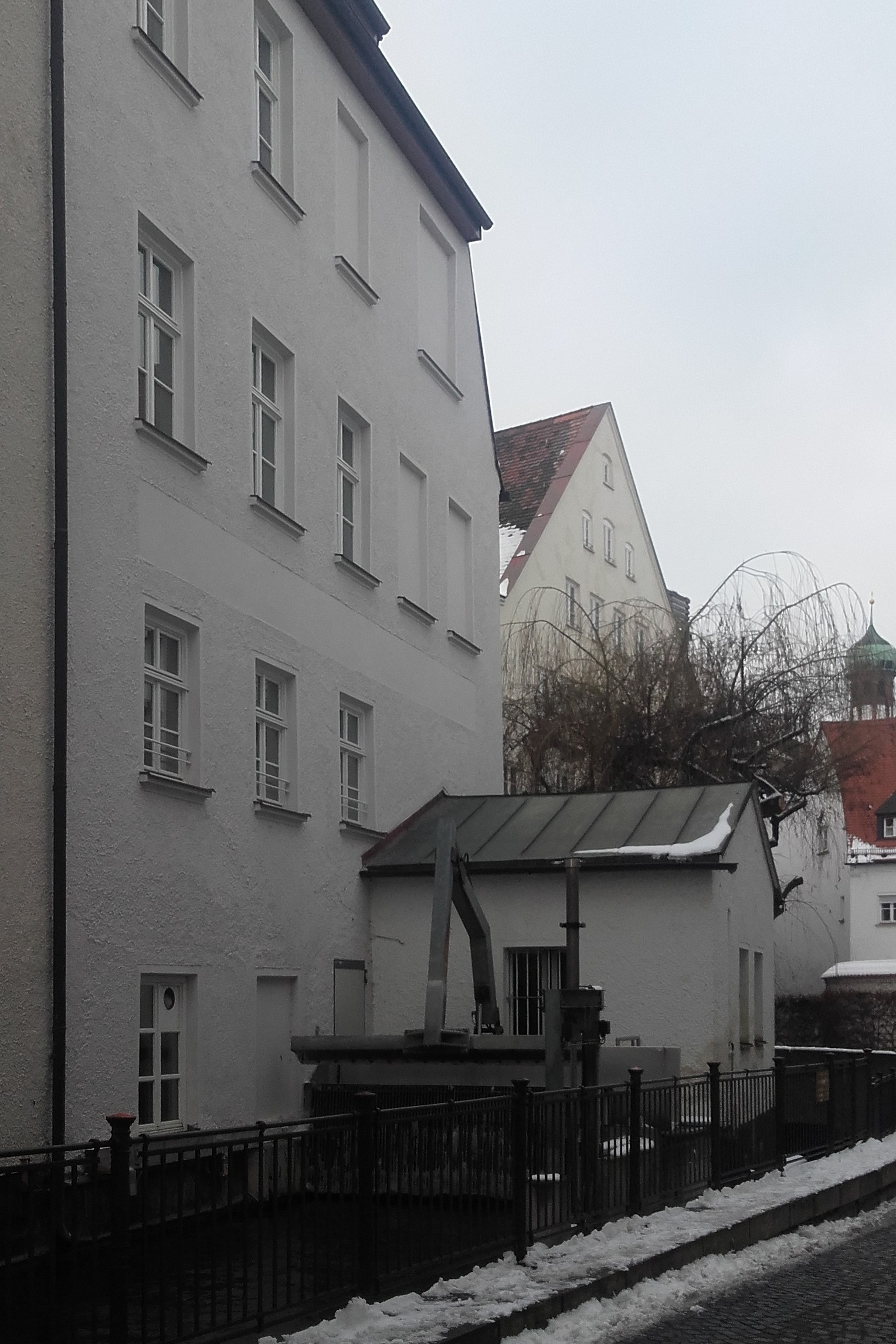 Rückseite Pfladermühle in Augsburg